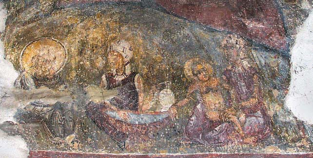 Рођење Исусово, фреска у цркви Свете Петке у Станичењу